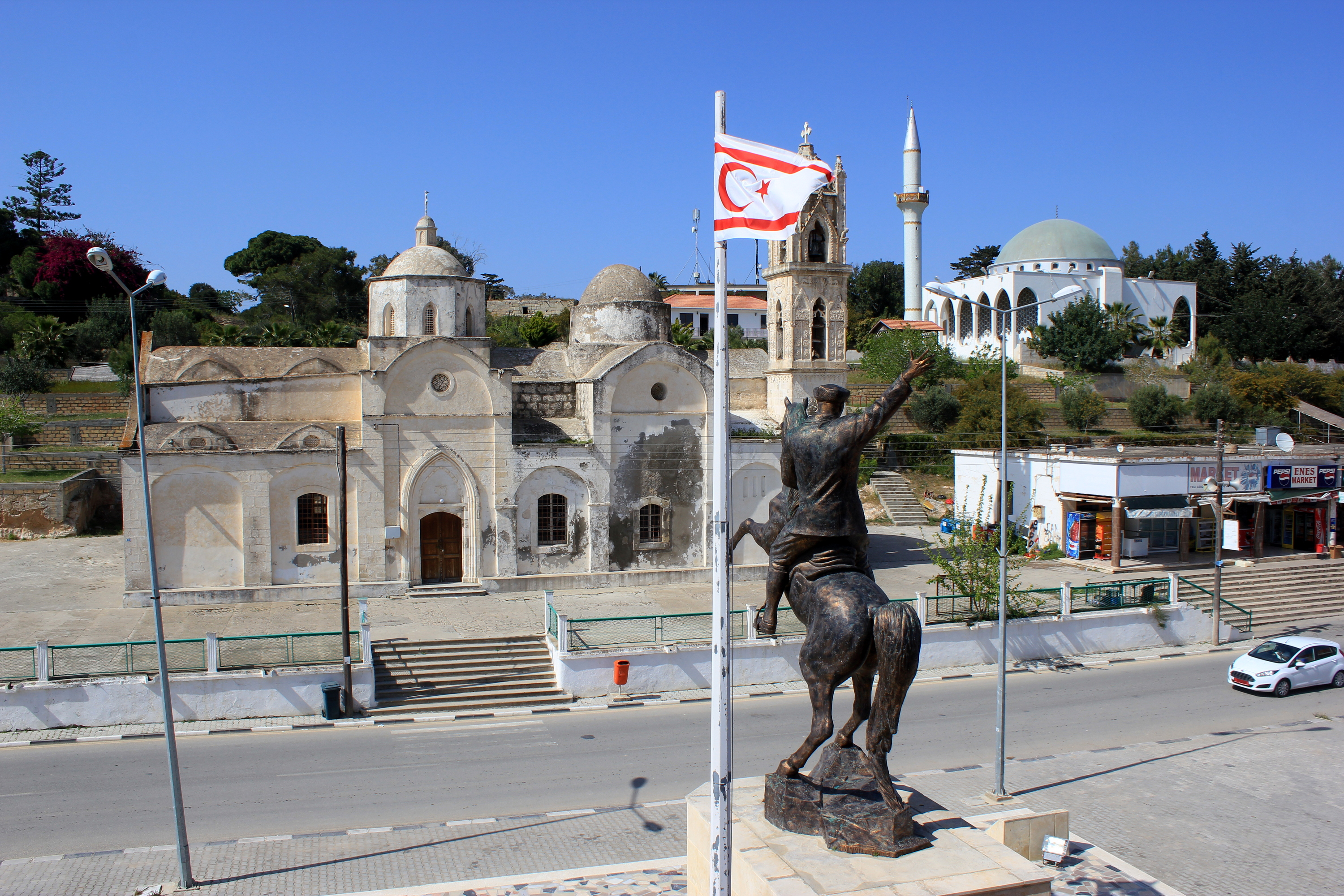 Ortskern von Rizokarpaso/Dipkarpaz auf der Karpas-Halbinsel, Zypern, mit der Agios-Synesios-Kirche, der Moschee und dem Atatürk-Denkmal.